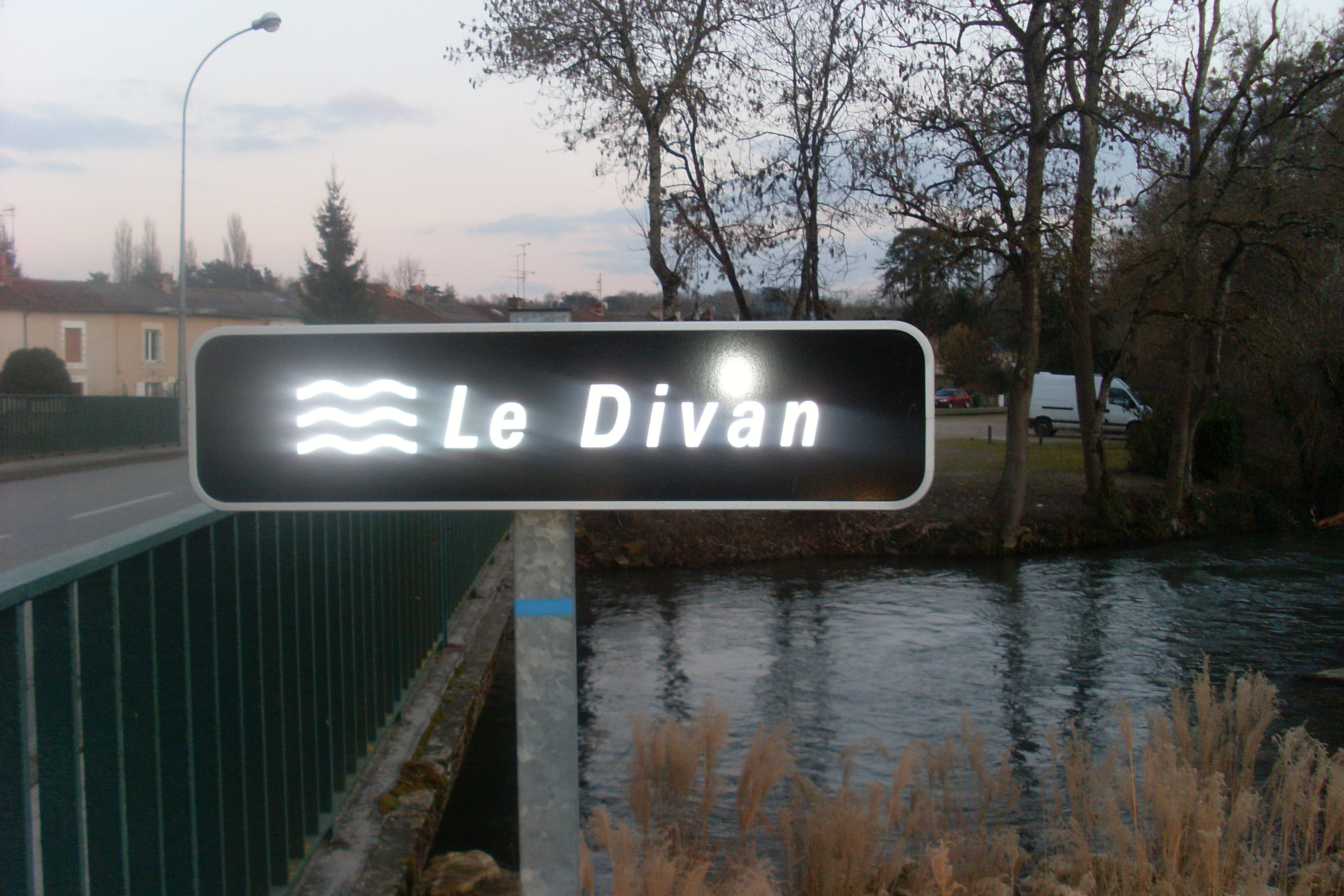 A Ligugé (et aussi Iteuil) l'un des bras du Clain prend pour nom Le Divan